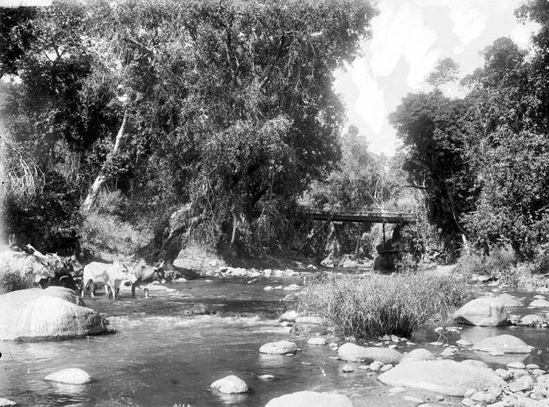 Kilimandscharo, der Weru Weru